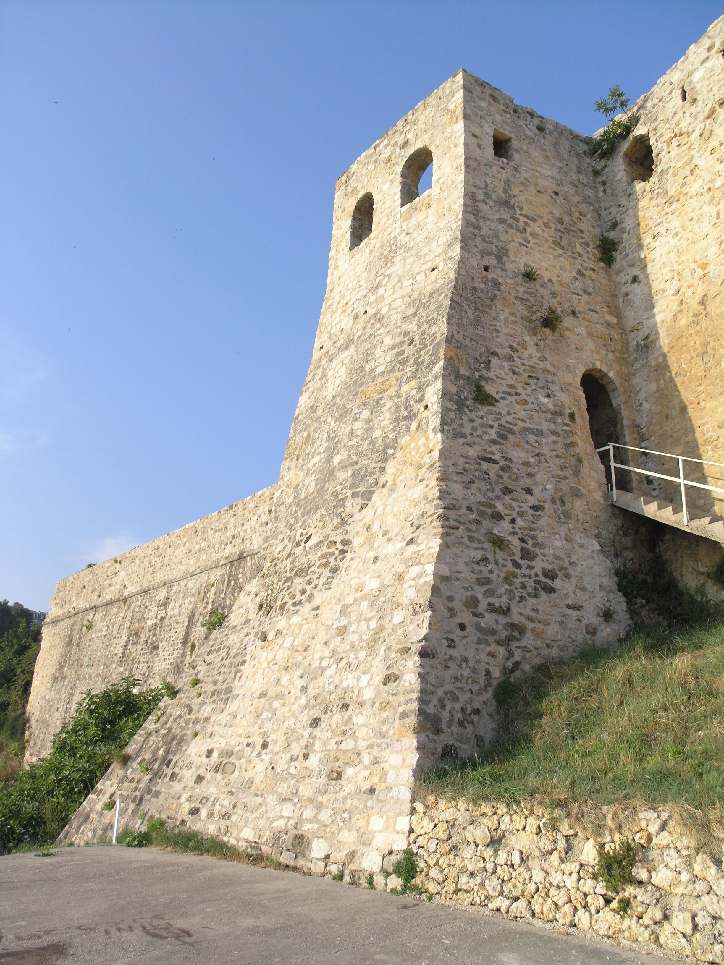 Černá Hora, Ulcinj - hradby starého města